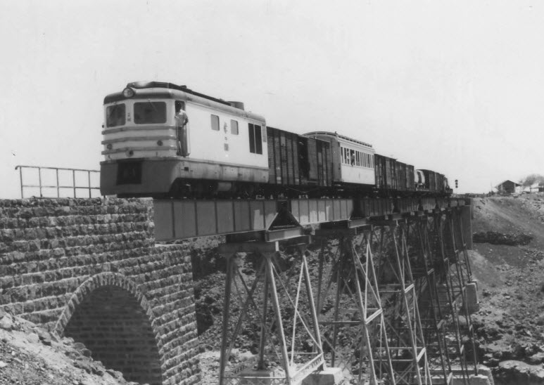 Von SLM und BBC gebaute Diesellokomotive der Baureihe M der Compagnie de Chemin de Fer Franco-Ethiopien de Jibuti à Addis Abeba (CFE) auf der Holl Holl-Brücke im Jahre 1960